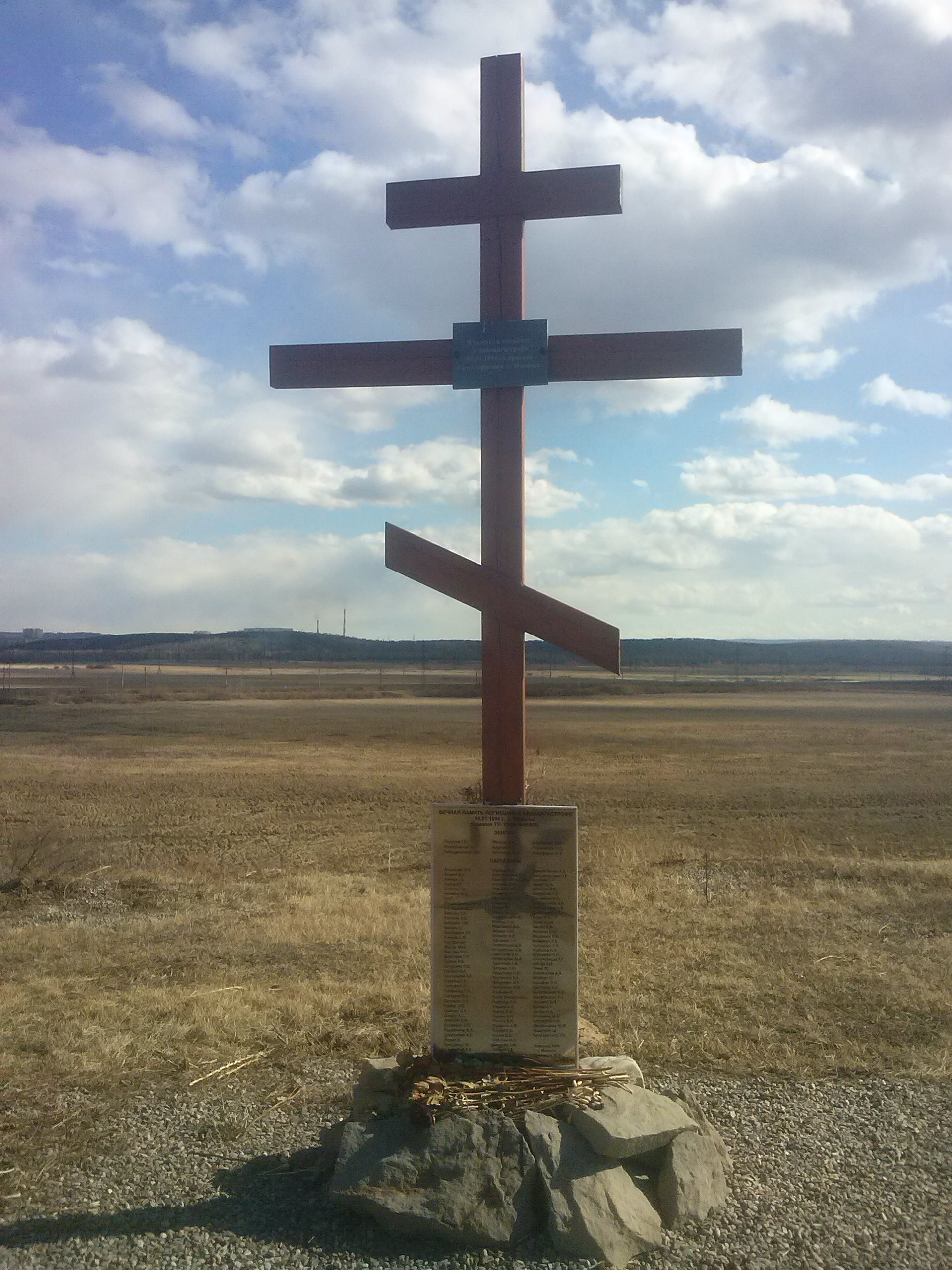 Деревянный крест, установленный прихожанами храма во имя святителя Софрония, на месте крушения самолета Ту-154М а/к Байкал 3 января 1994